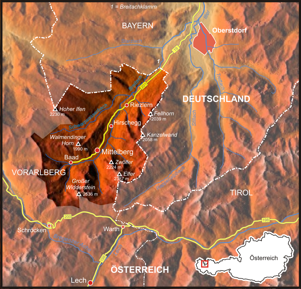 Karte des Kleinwalsertals